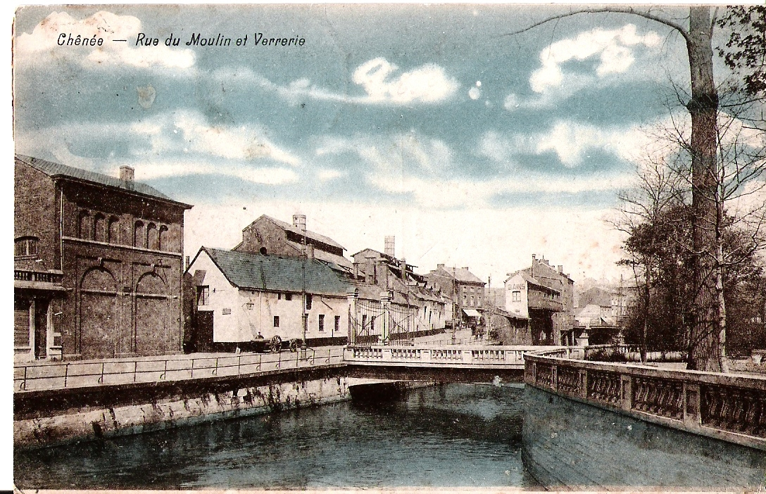 Patrimoine industriel (1850), Rue du Gravier, 1 "Chênée - Rue du Moulin et Verrerie"